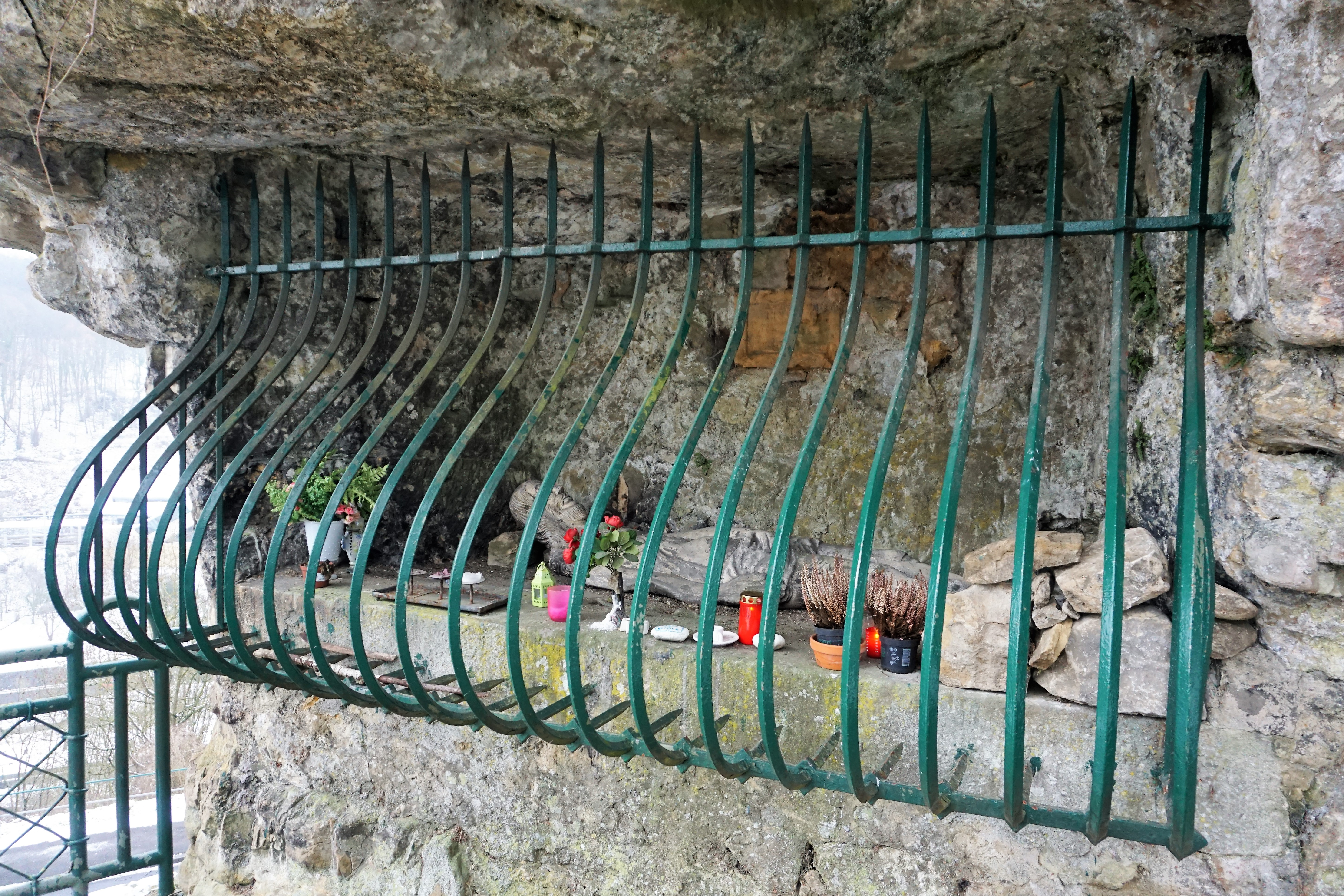 Lëtzebuerg-Lampertsbierg. D'Grott vum Péiter Onrou.